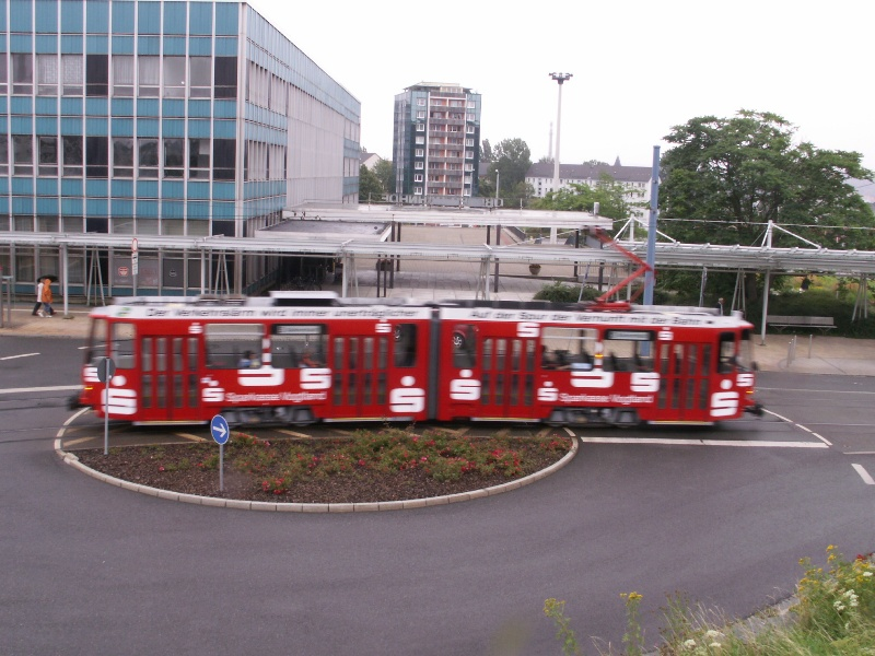 Oberer Bahnhof Plauen (Vogtland)